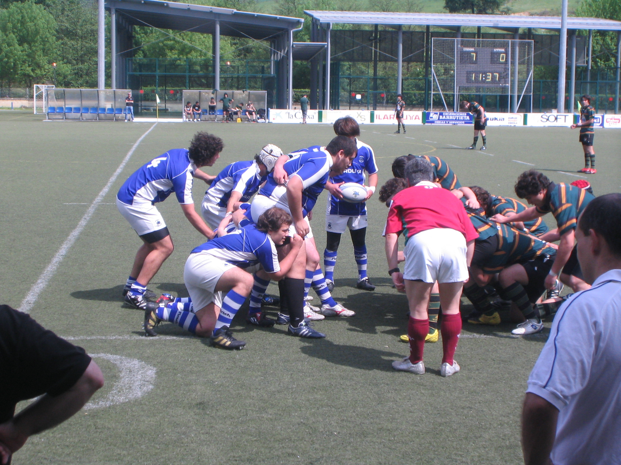 Un momento de juego de un equipo del Durango Rugby Taldea contra otro del Gernika Rugby Taldea.